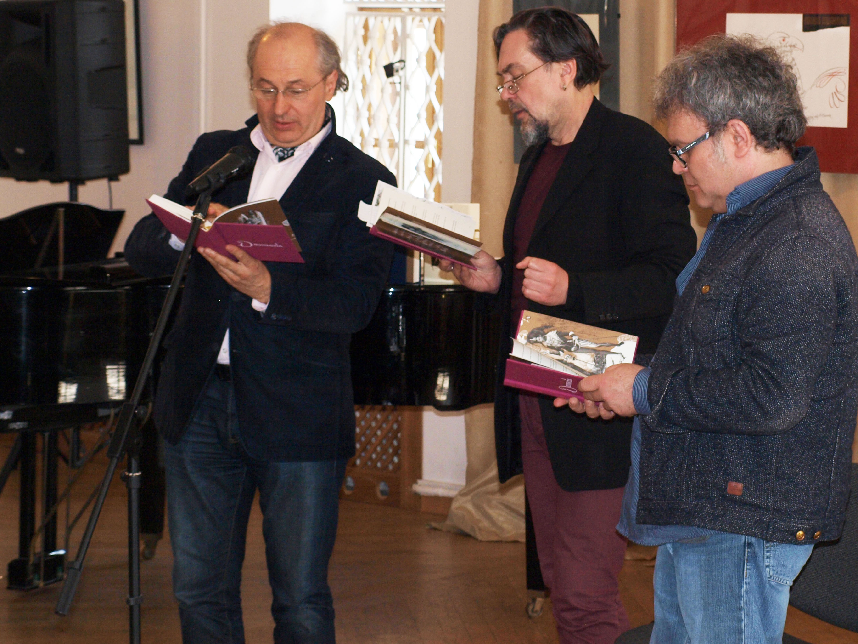 Письменник Юрій Андрухович, видавець Іван Малкович (ліворуч) і художник Владислав Єрко (праворуч) читають уривок «Ромео і Джульєтта». Музей книги та друкарства України (Київ).